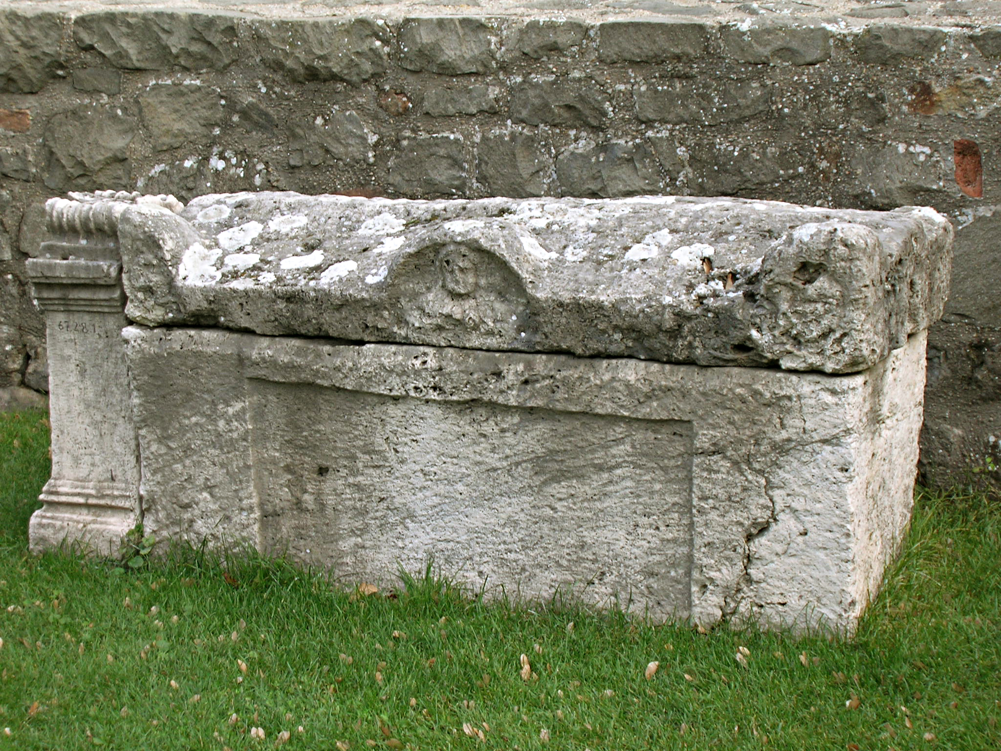 Römischer Sarkophag im Kastellmuseum, Esztergom, Ungarn.